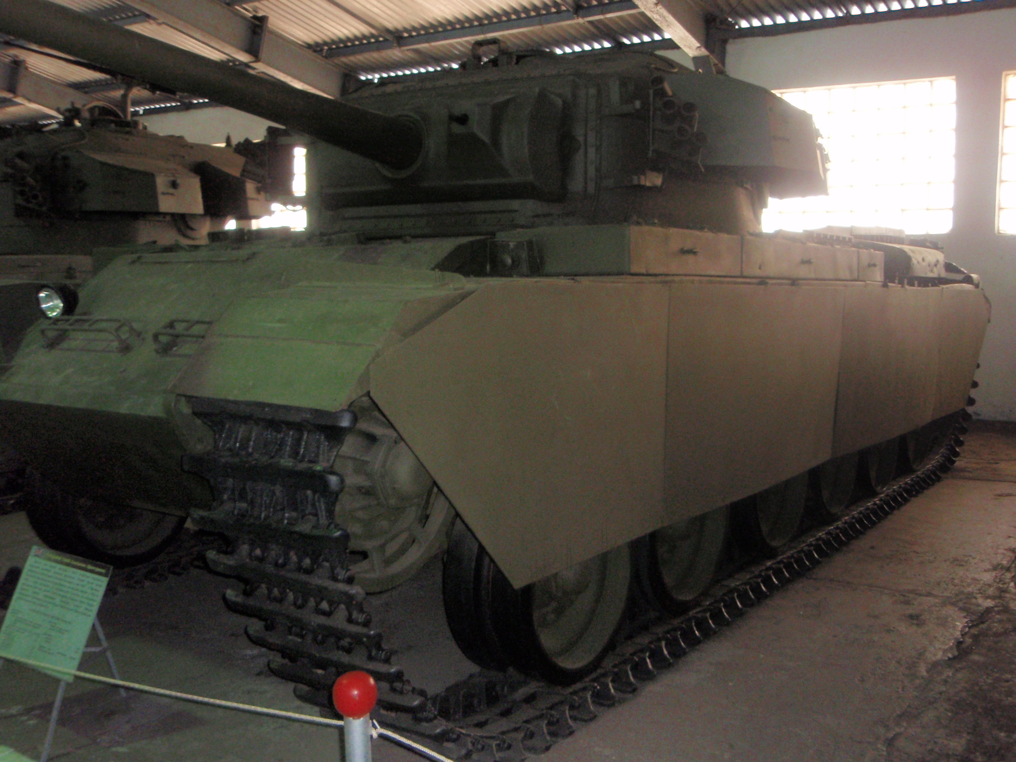 Британский средний танк Centurion в Кубинке